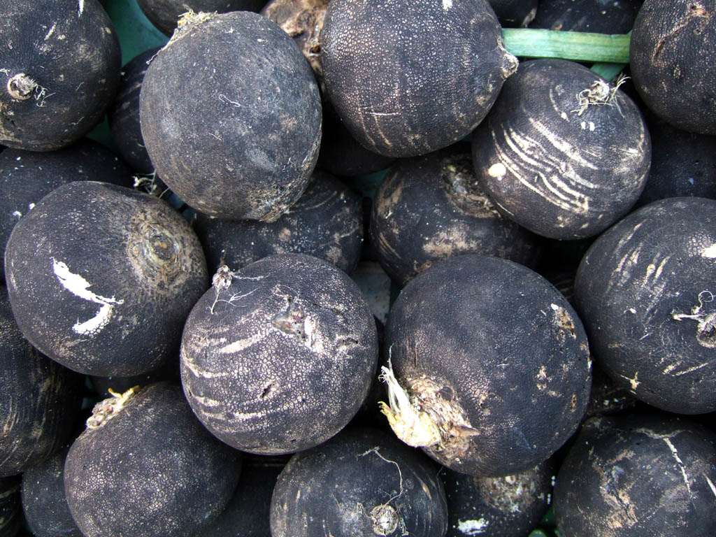 Schwarzer Winterrettich